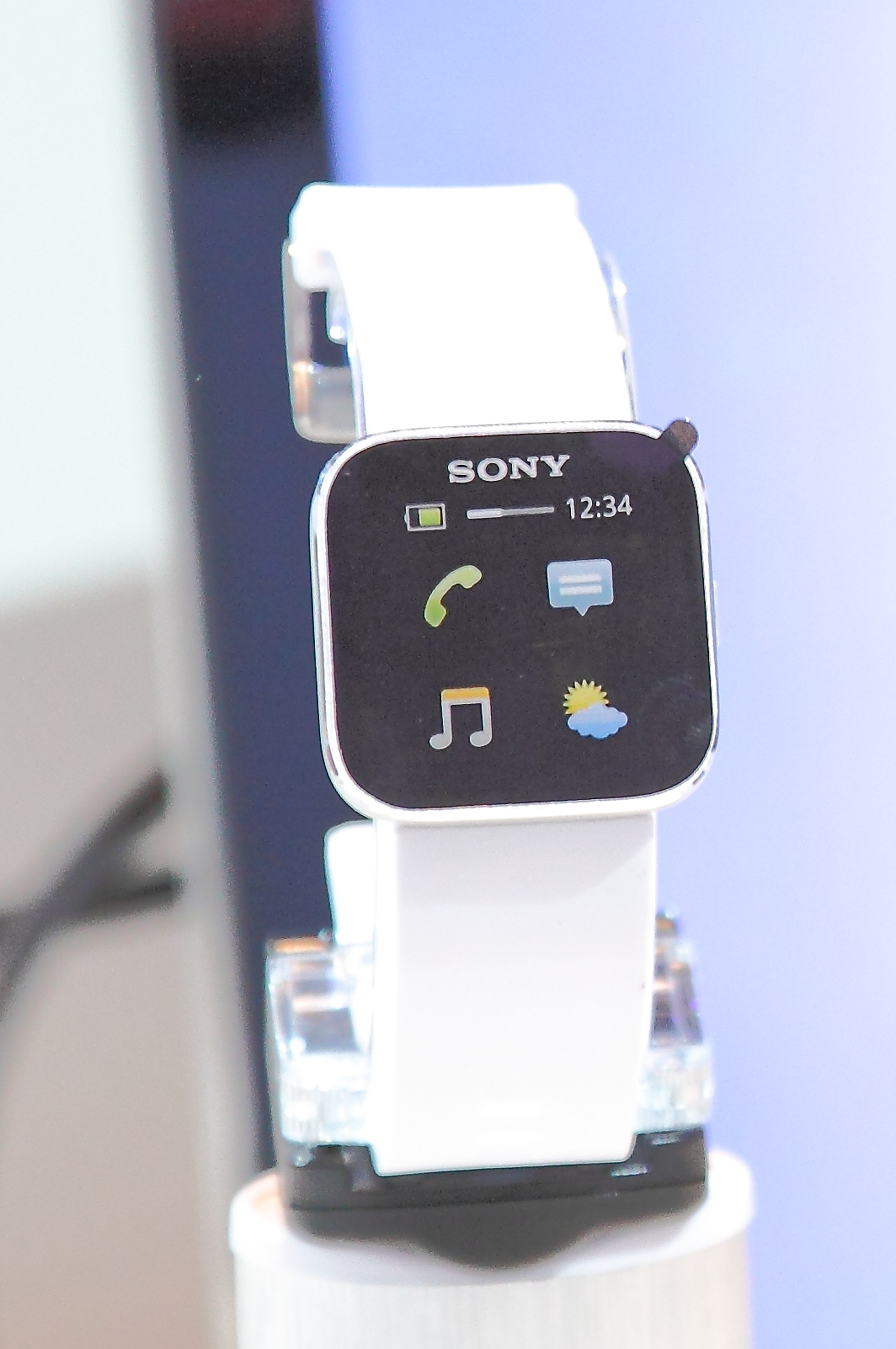 Sony; SmartWatch; MN2; Android 2.1 and later; multi-level touchscreen; bluetooth 3.0; OLED 1.3 display